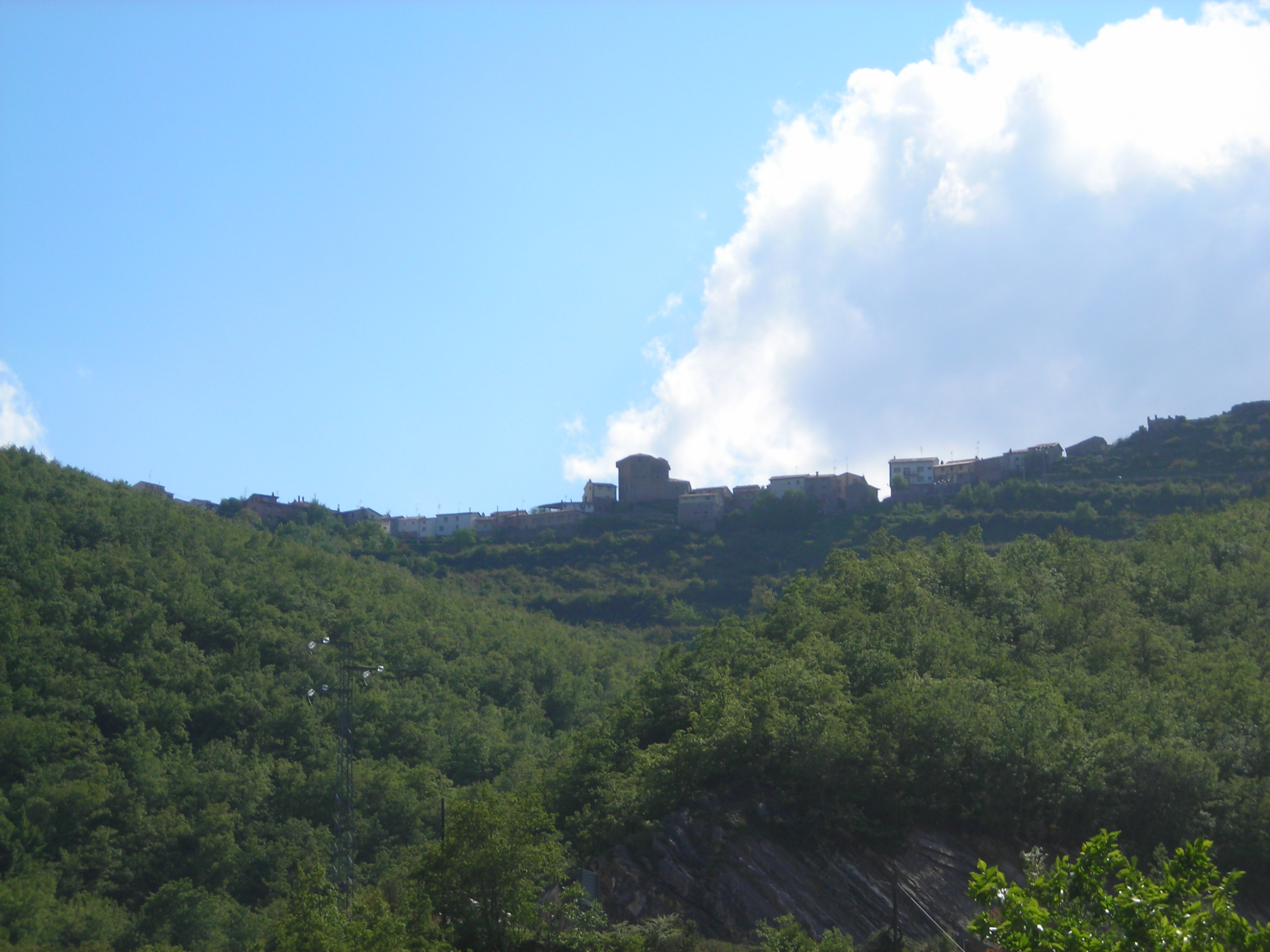 Vista de Trevijano desde la LR-250